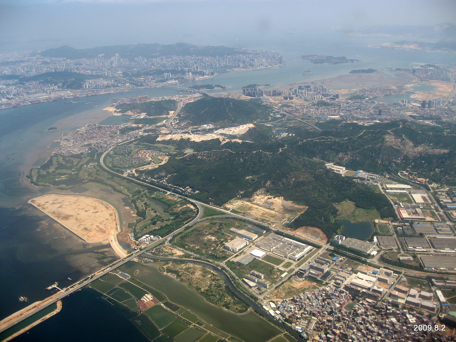 厦门高崎机场上空, 飞机正在降落，下面应该是海沧区